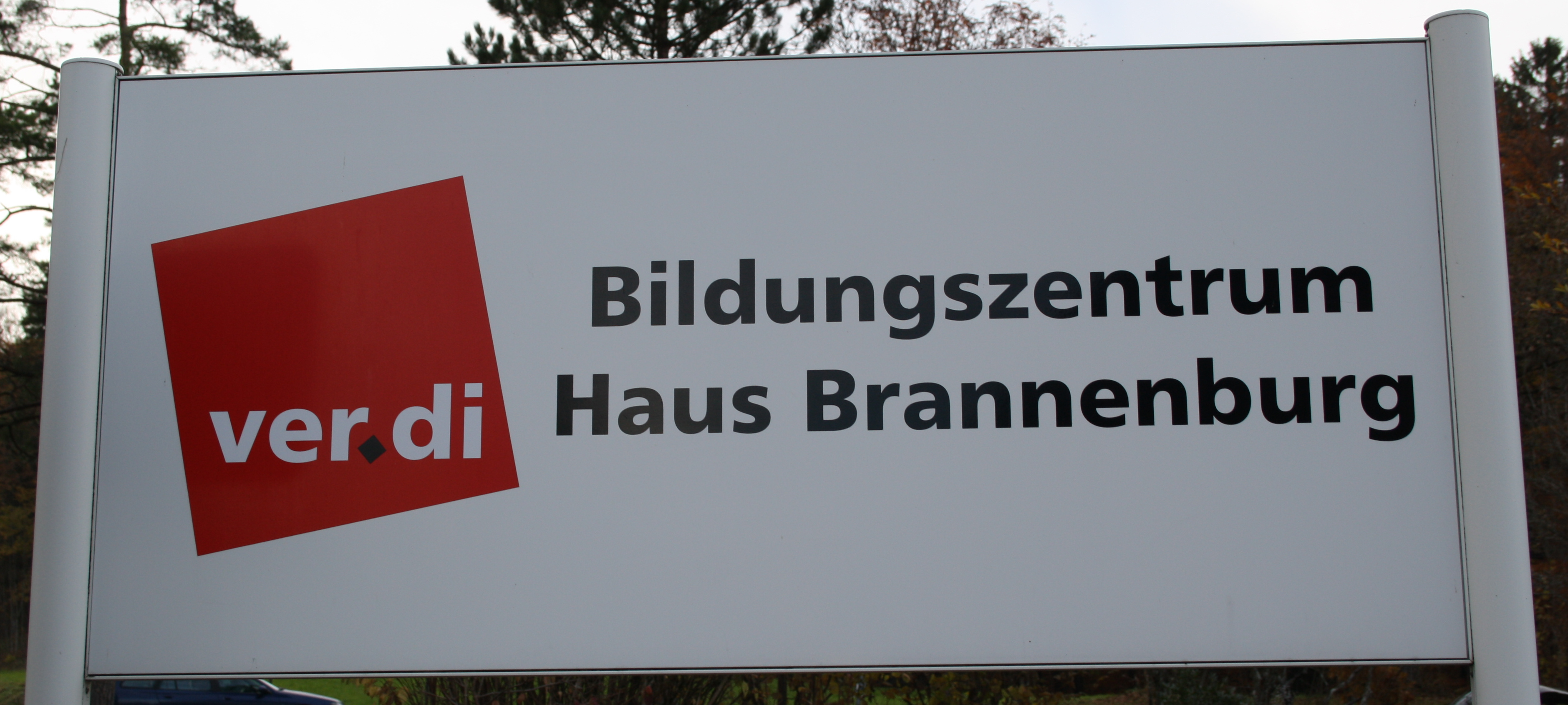 Tafel an der Einfahrt von Haus Brannenburg